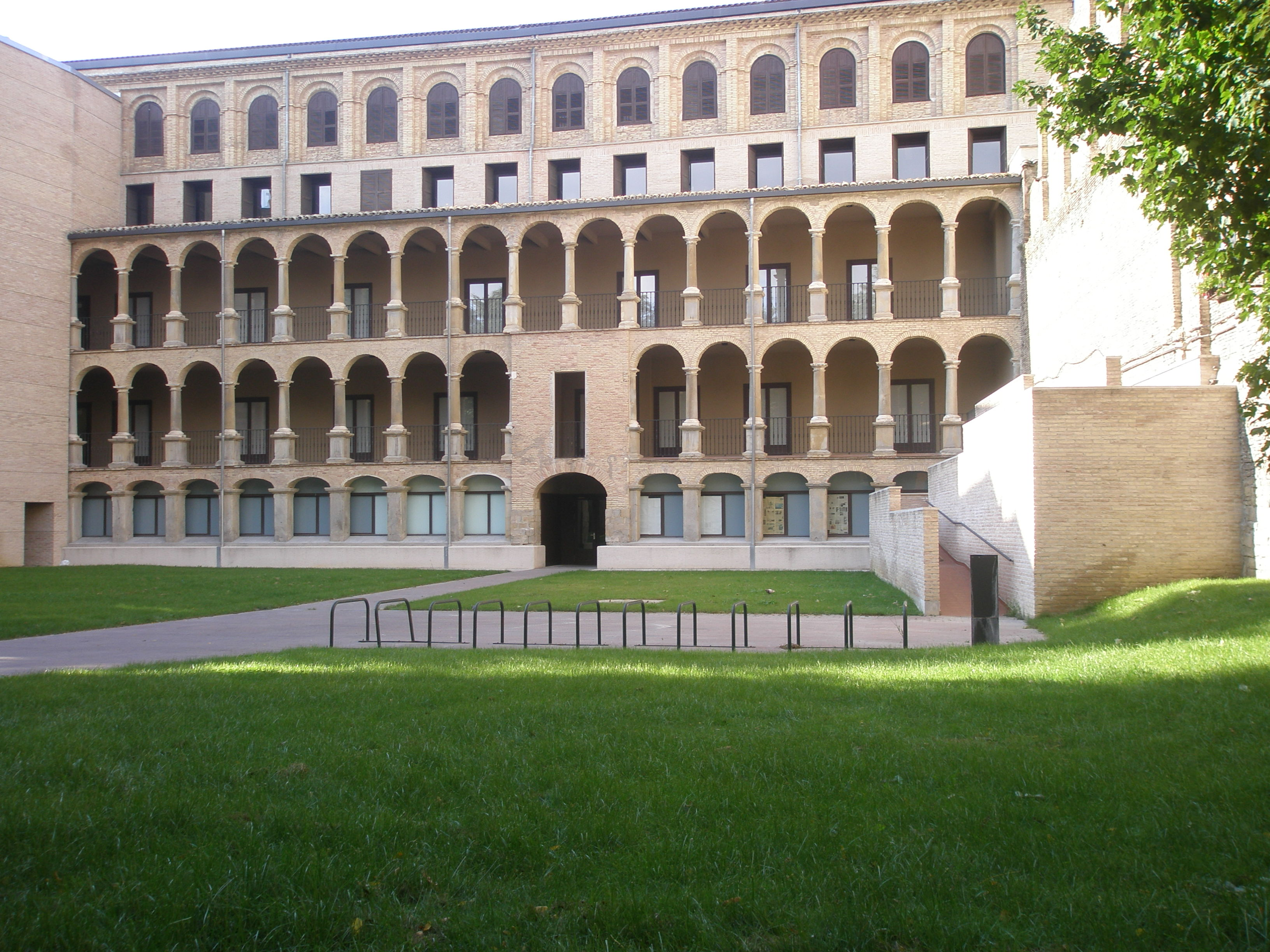 Magnífica galería de arcos, tras el palacio barroco de Ezpeleta en Pamplona.